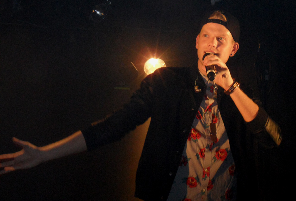 Scott (concert à La Flèche d'or à Paris)